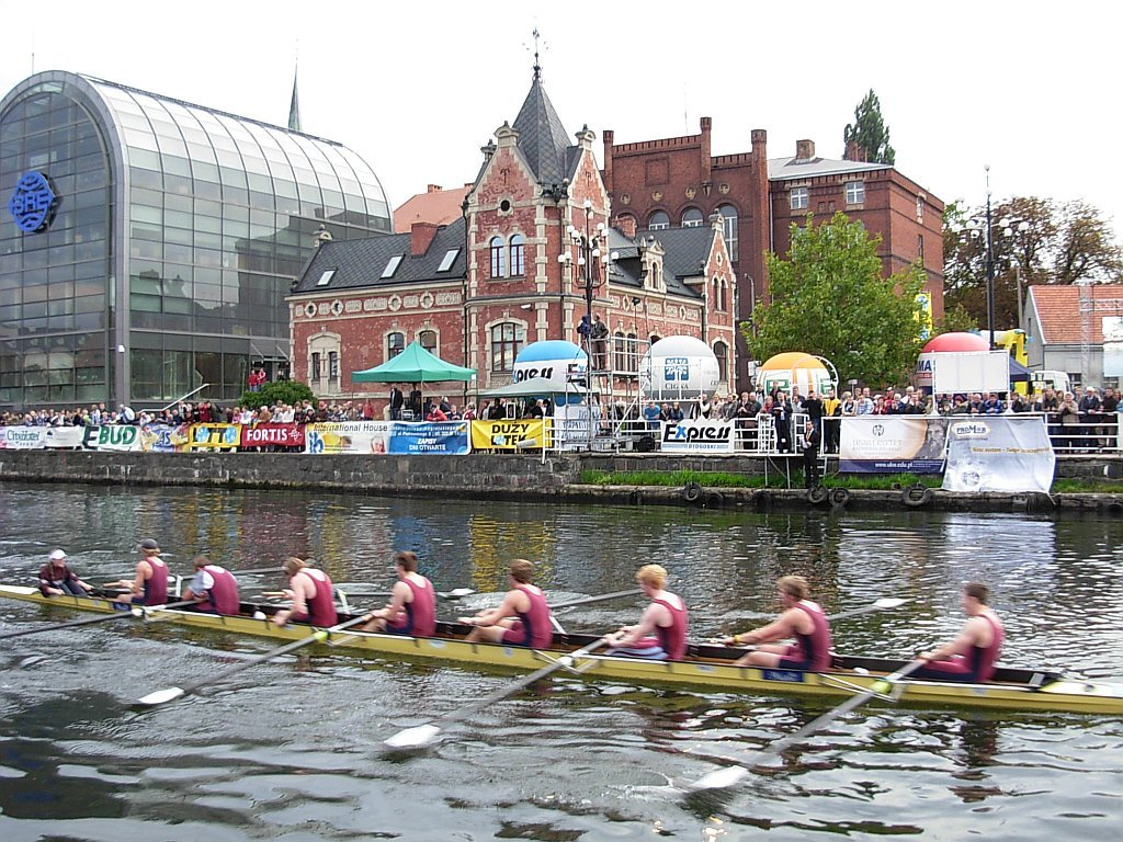 Wielka Wioślarska - wyścig wioślarzy w Bydgoszczy